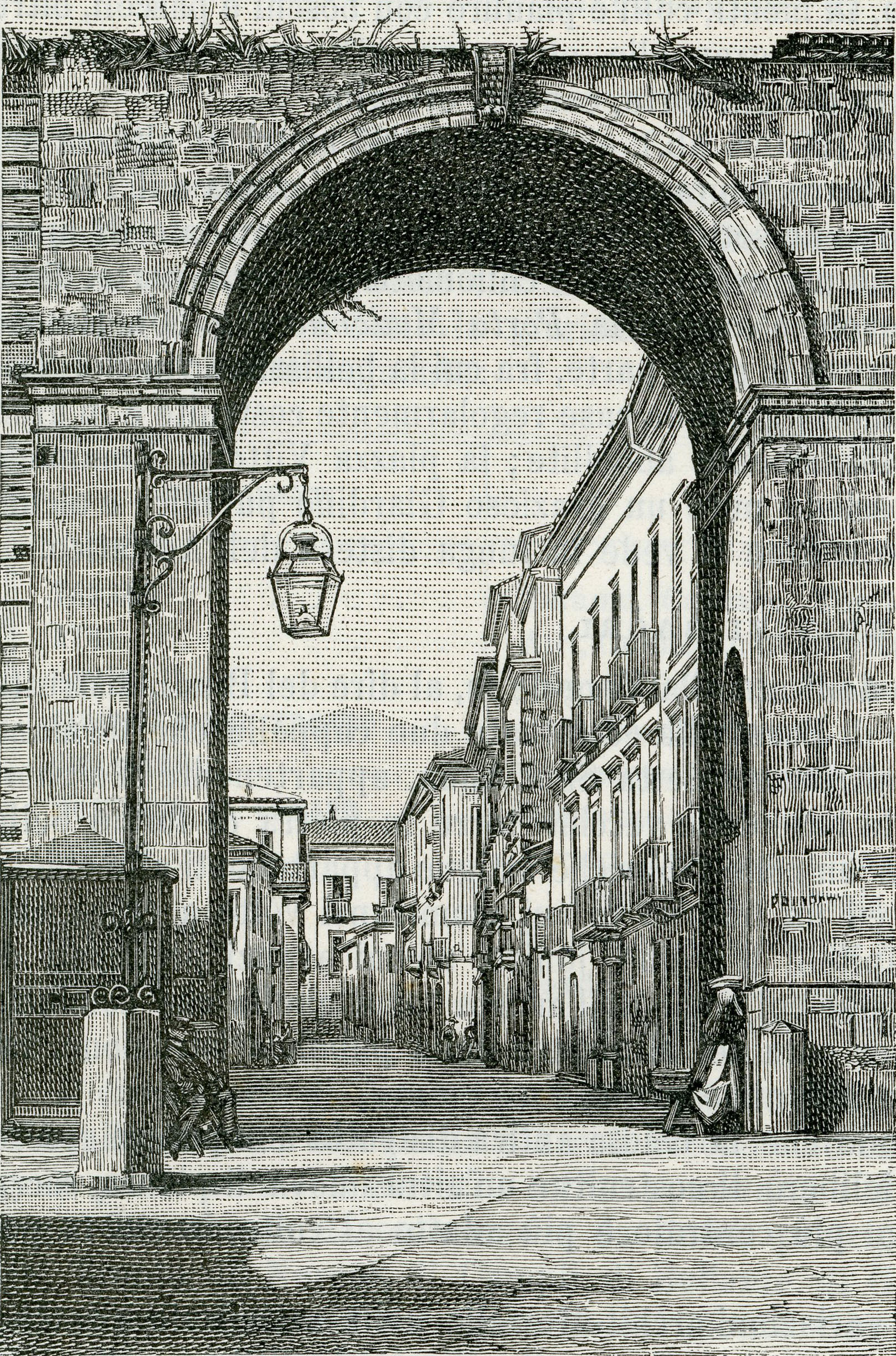 Teramo: porta Madonna (xilografia di Barberis 1898).